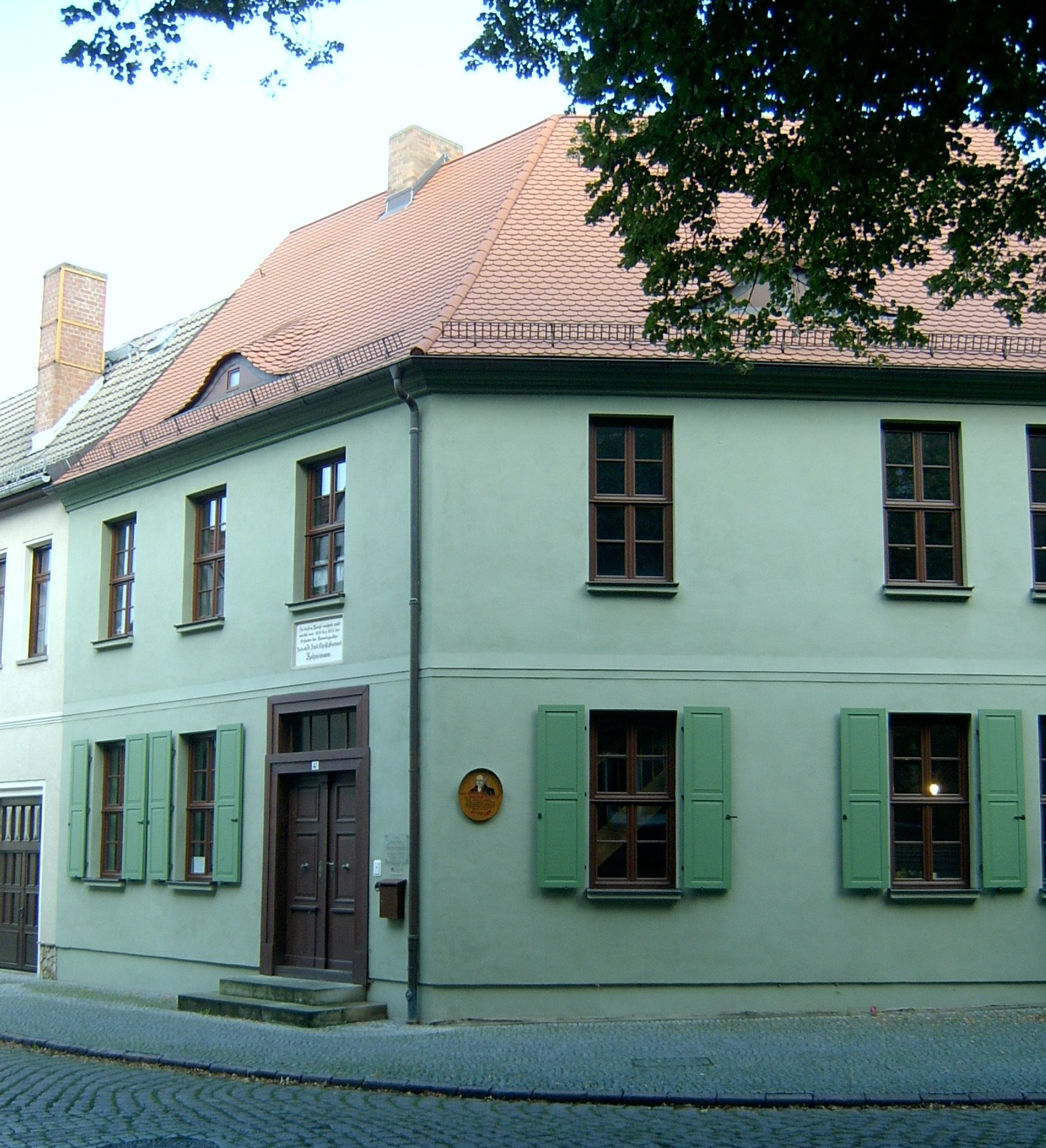 Ehemaliges Wohnhaus von Samuel Hahnemann Köthen (Anhalt) in der Wallstraße. Hier lebte Hahnemann von 1821 bis 1835. Erbaut wurde das Gebäude im 18. Jahrhundert.